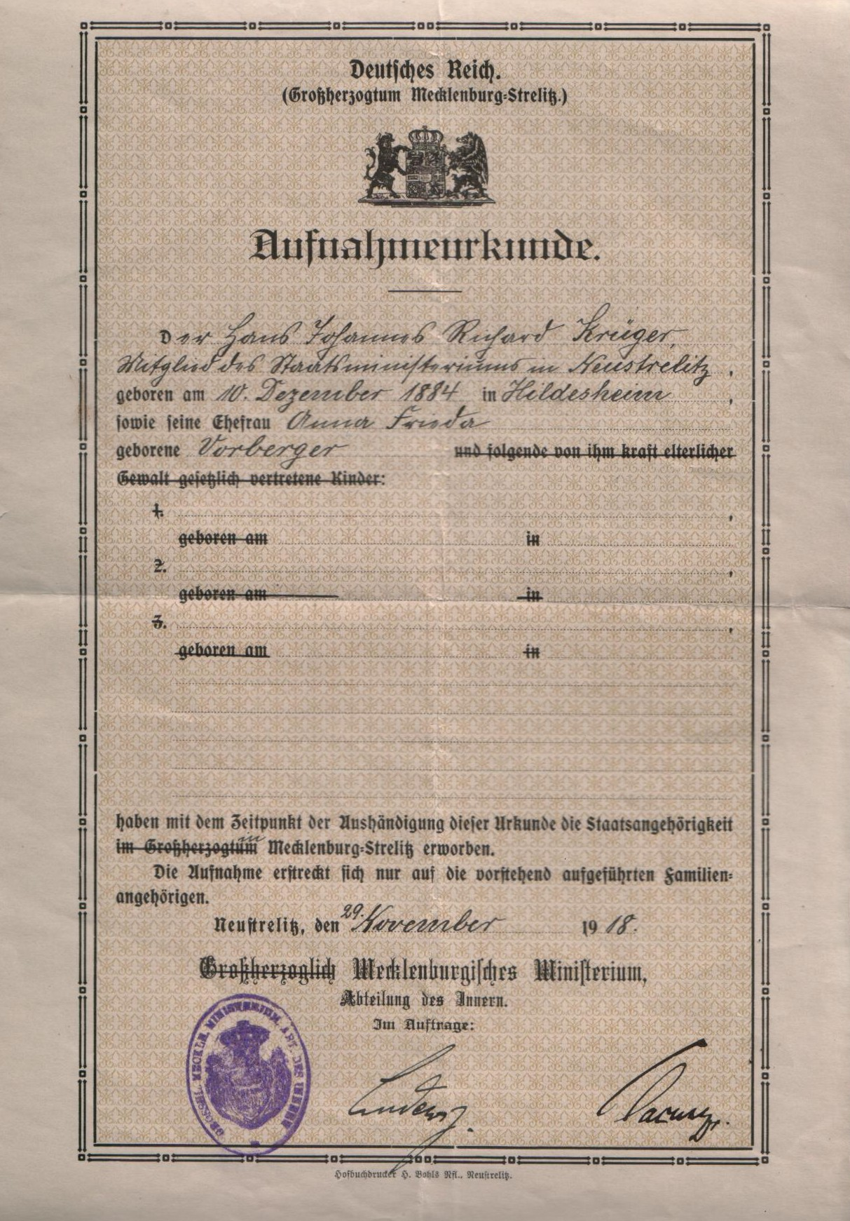 Aufnahmeurkunde zur Aushändigung der Staatsbürgerschaft des Landes Mecklenburg-Strelitz für Hans Krüger und Ehefrau Anna